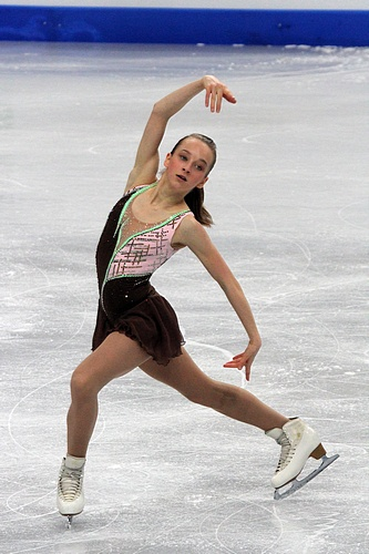 Герли Лийнамяэ (Эстония) на чемпионате мира по фигурному катанию среди юниоров 2012